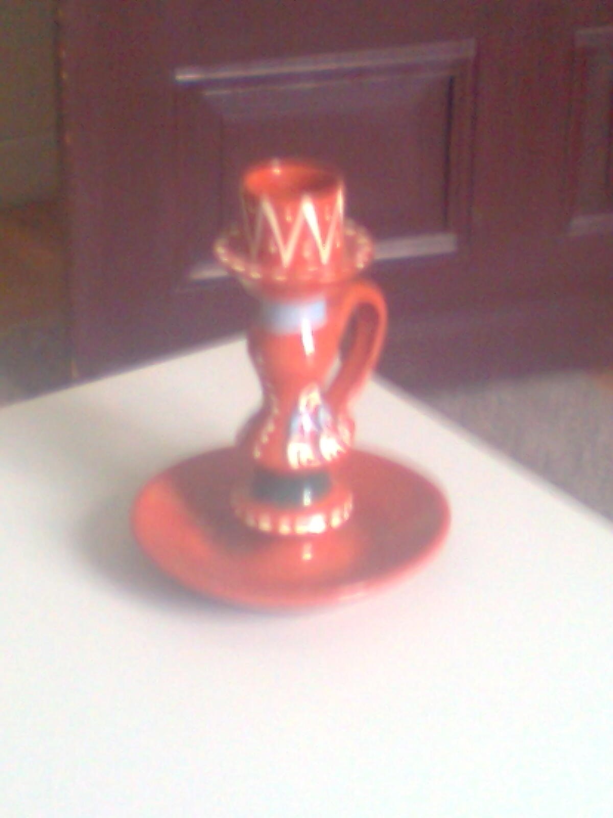 Świecznik